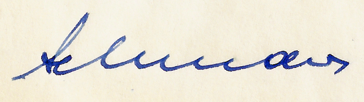 Michael Schmaus. Signatur seines handschriftlichen Briefes vom Dezember 1980